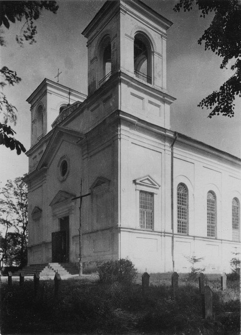 Беларуская (тарашкевіца): Берасьце (Bieraście). Касьцёл Узвышэньня Сьвятога Крыжа